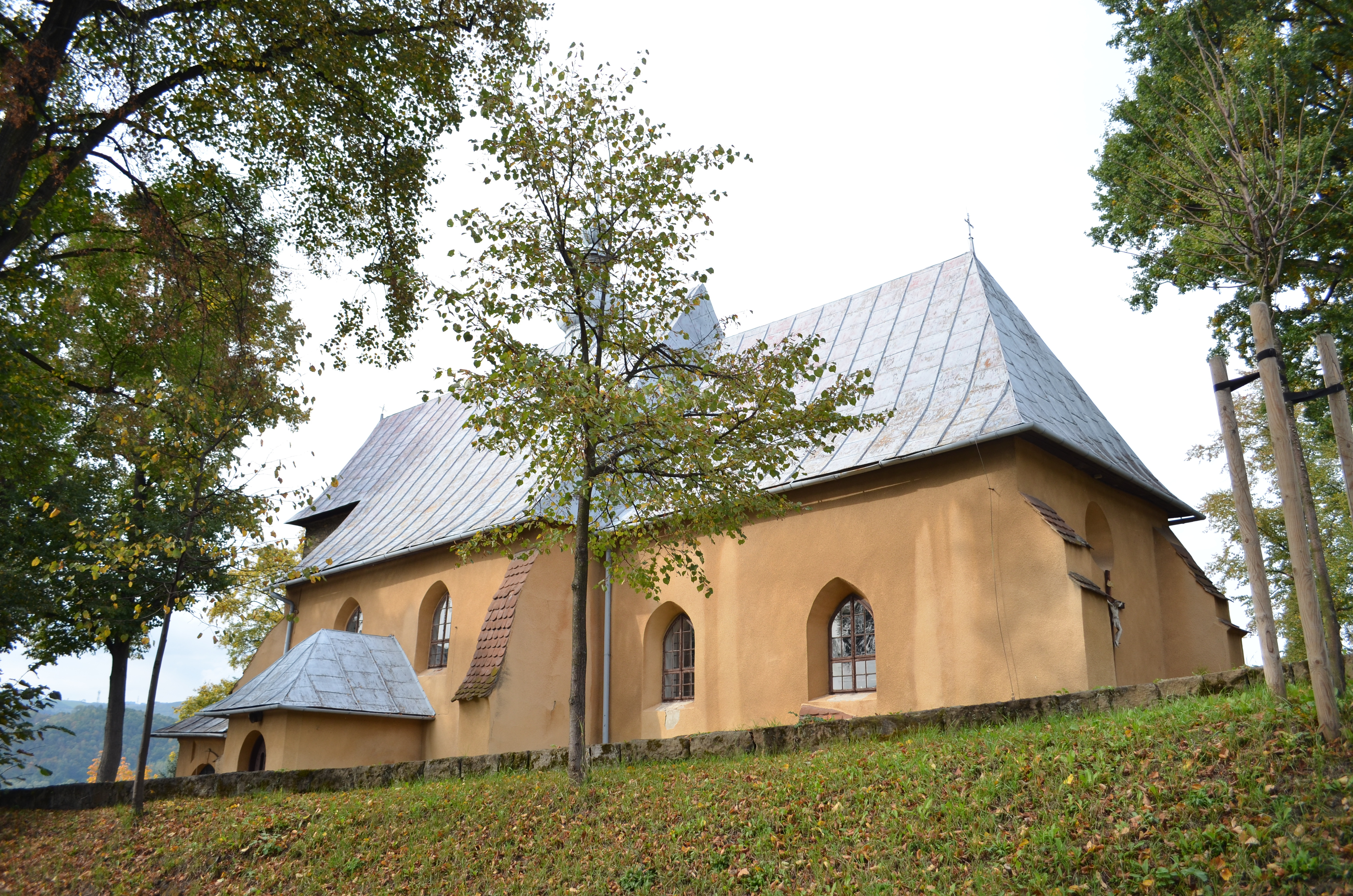 Wielogłowy. Kościół par. p.w. Wniebowzięcia NMP, 1318, XVII.